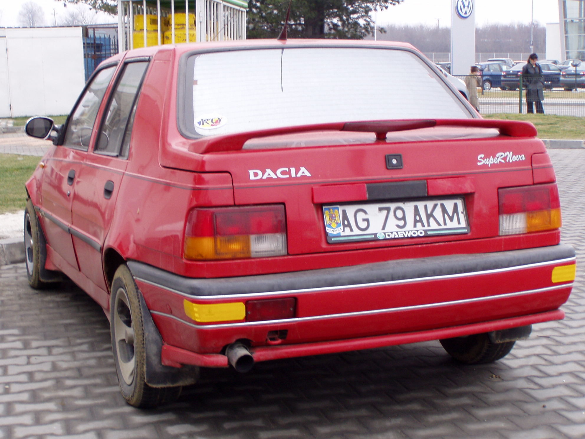 Dacia SupeRNova in Romania